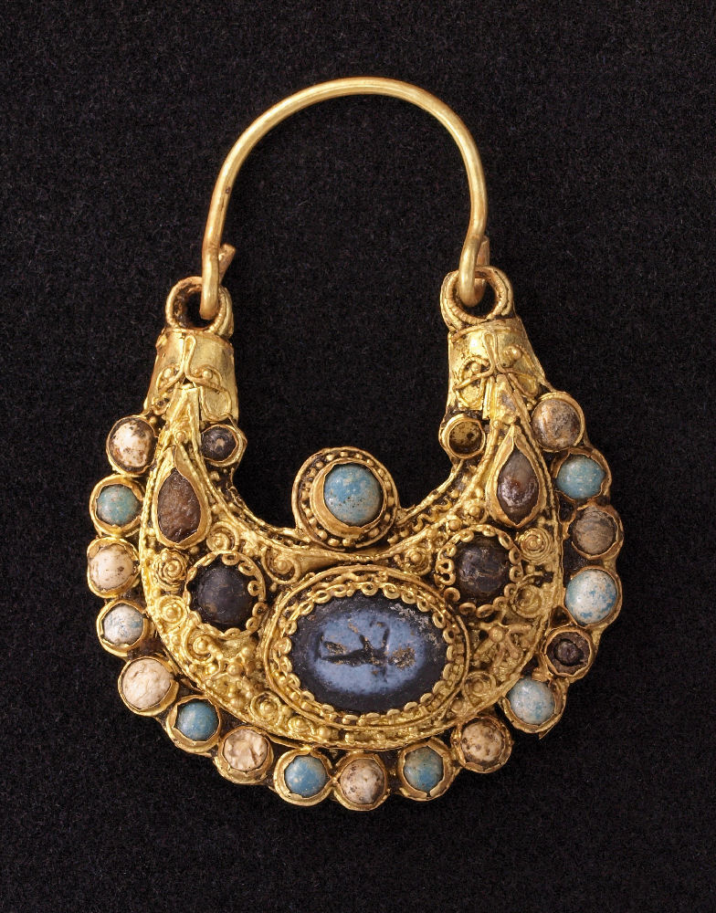 goldener Ohrschmuck auf Archäologischer Zone Köln